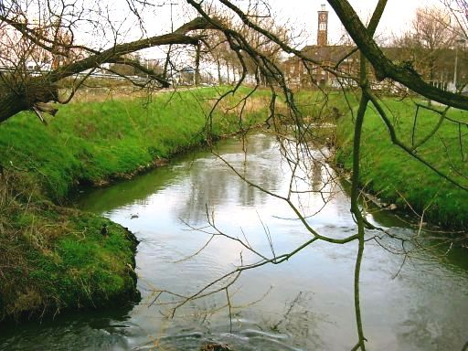 Den Demmer zu Hasselt